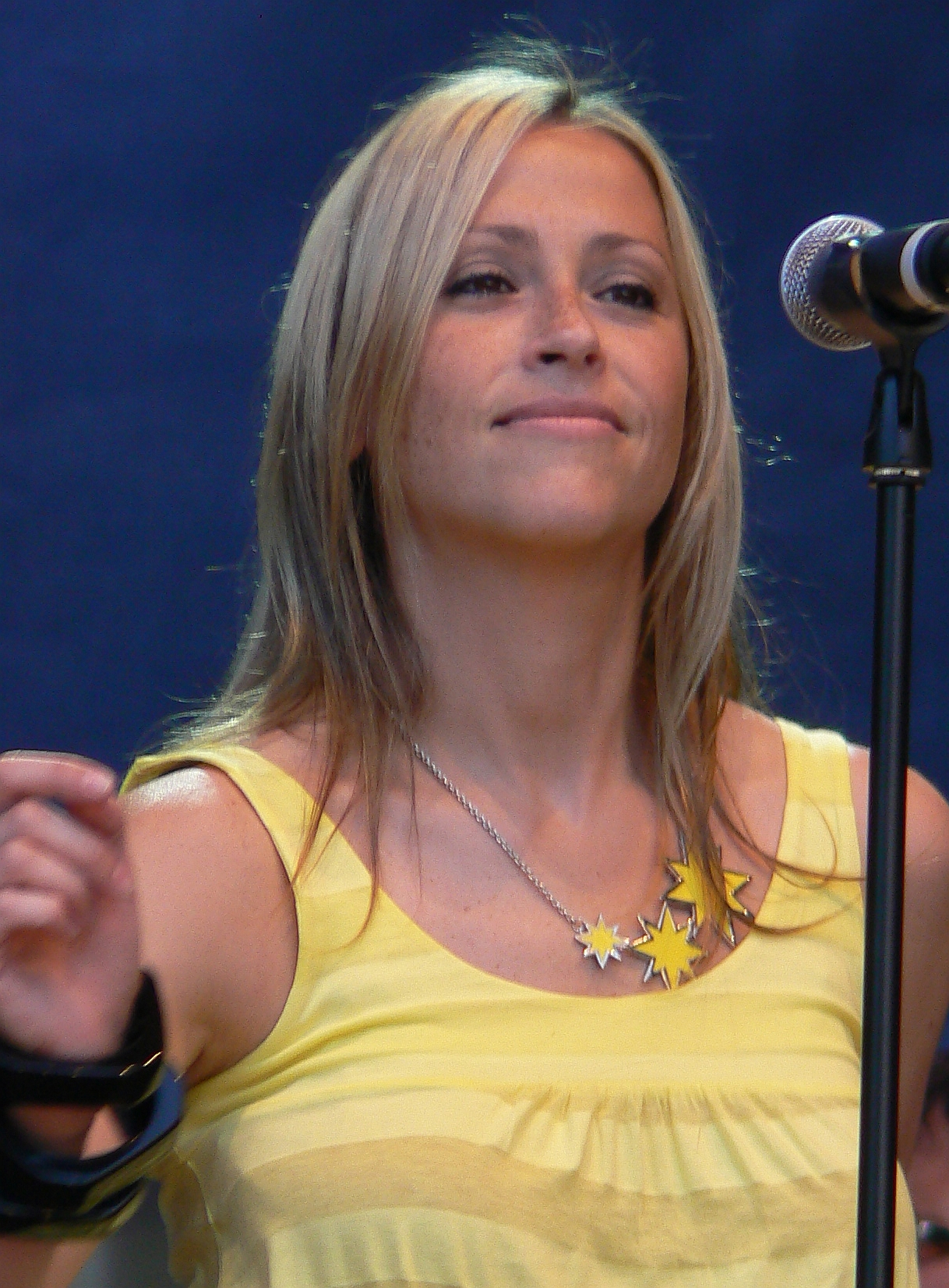 All Saints (Girl Group)